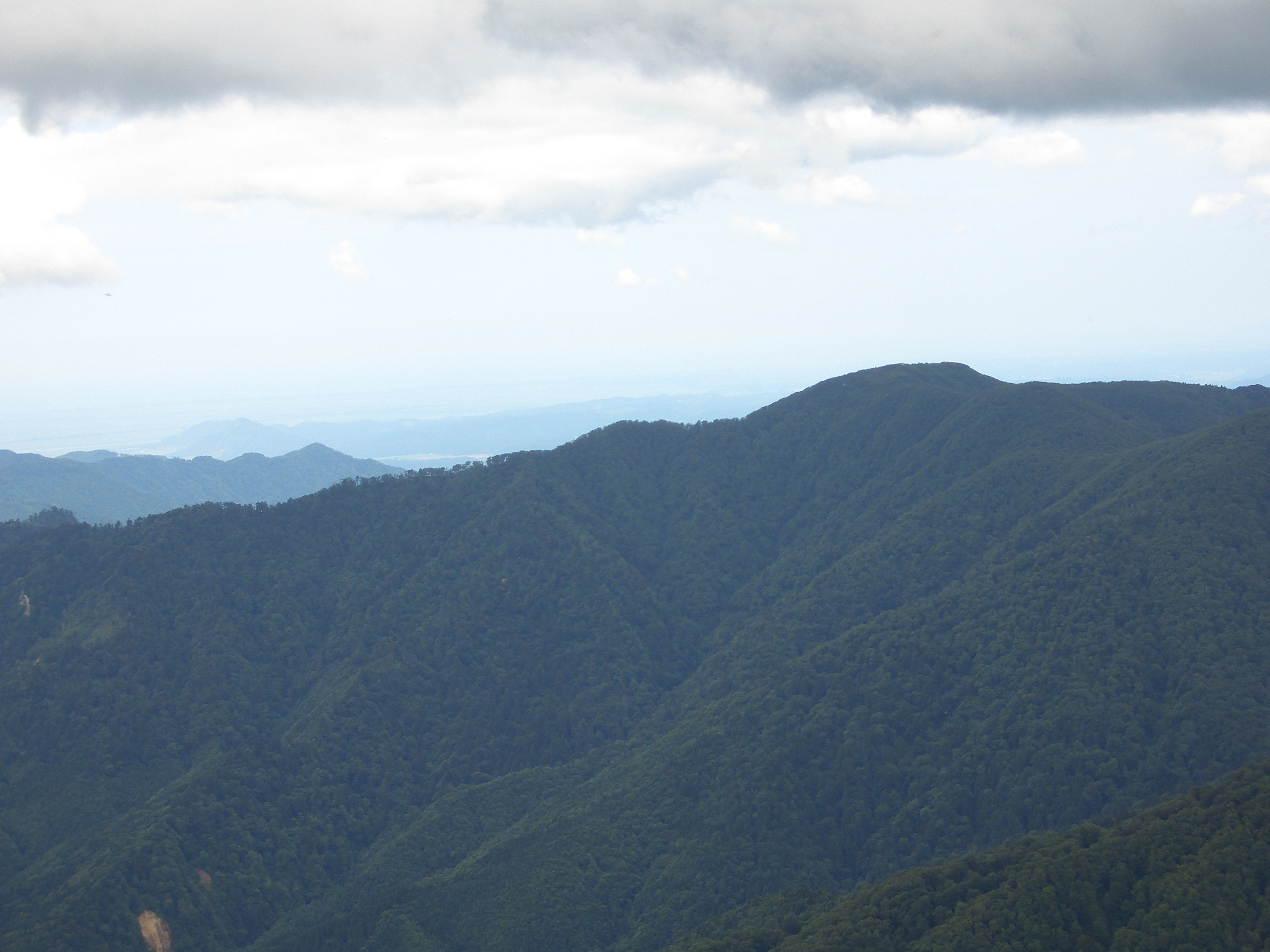 太平山から見た馬場目岳